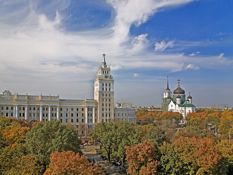 Вид на Благовещенский собор (Воронеж)